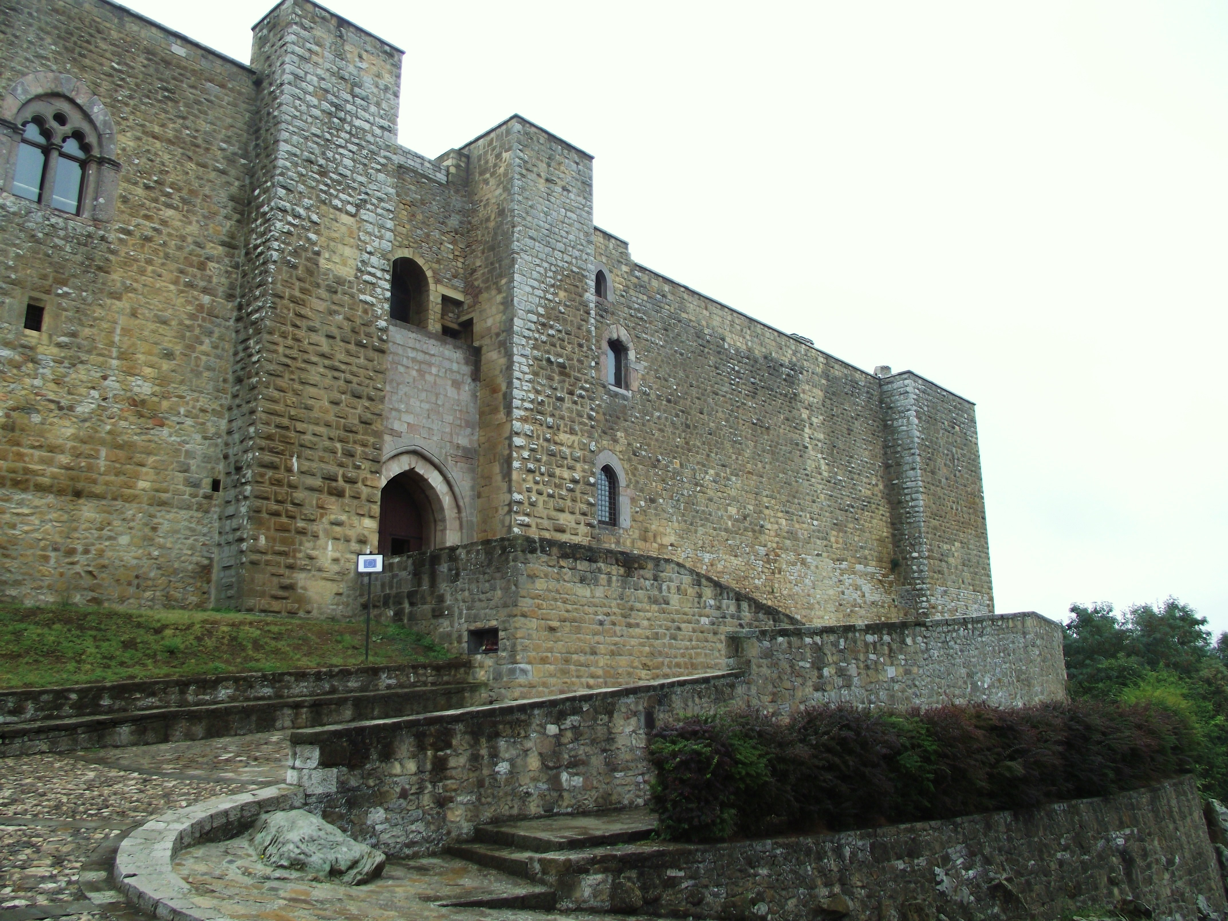 il Castello di Lagopesole